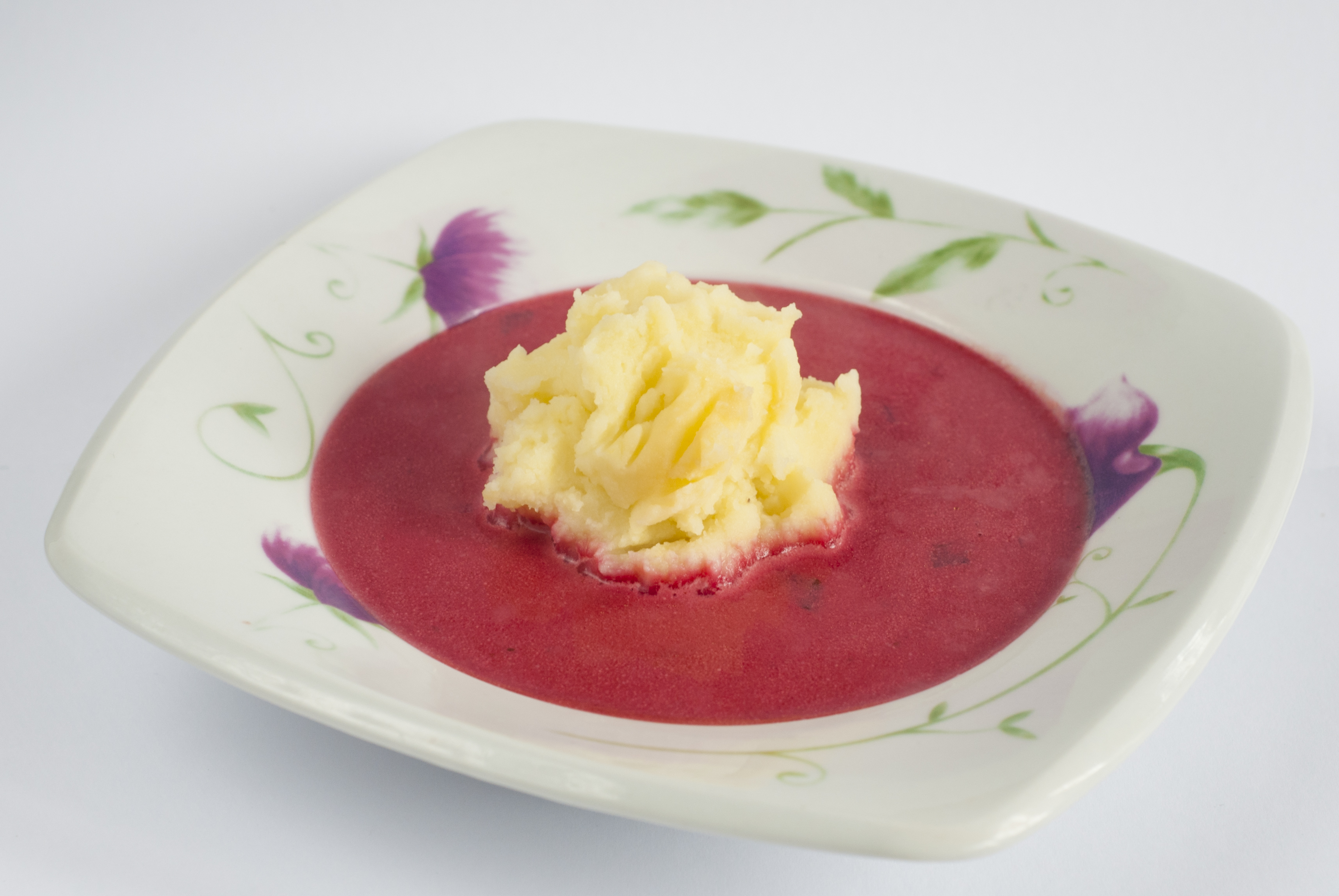 Tradycyjna polska zupa z botwiny.